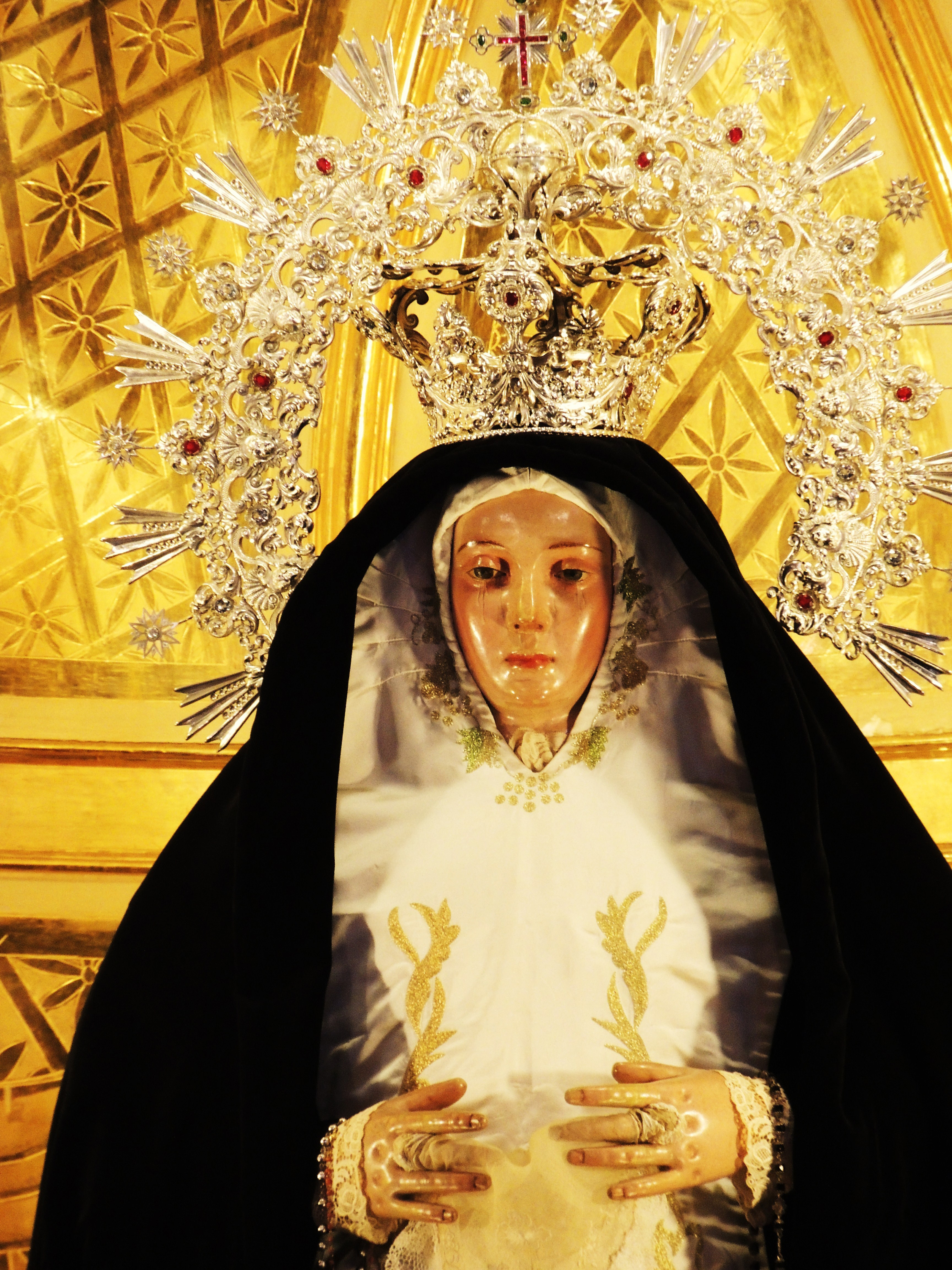 Nuestra Señora de la Soledad Coronada. Parroquia de San Francisco de Asís. Las Palmas de Gran Canaria.